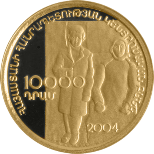 Памятная монета Армении 2004 года "Аршиль Горки" - 10000 драм - золото 999